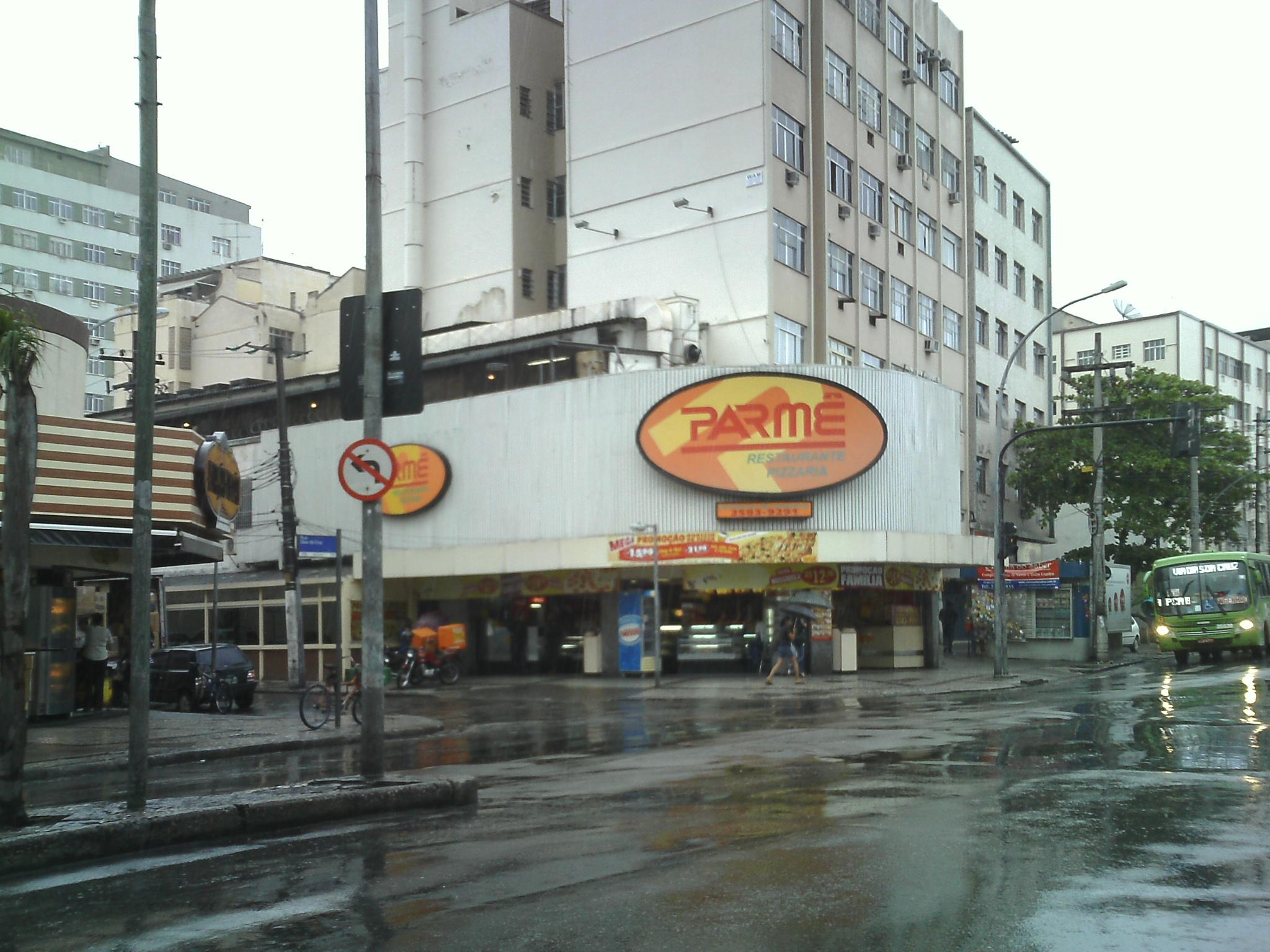 Parmê do Méier.